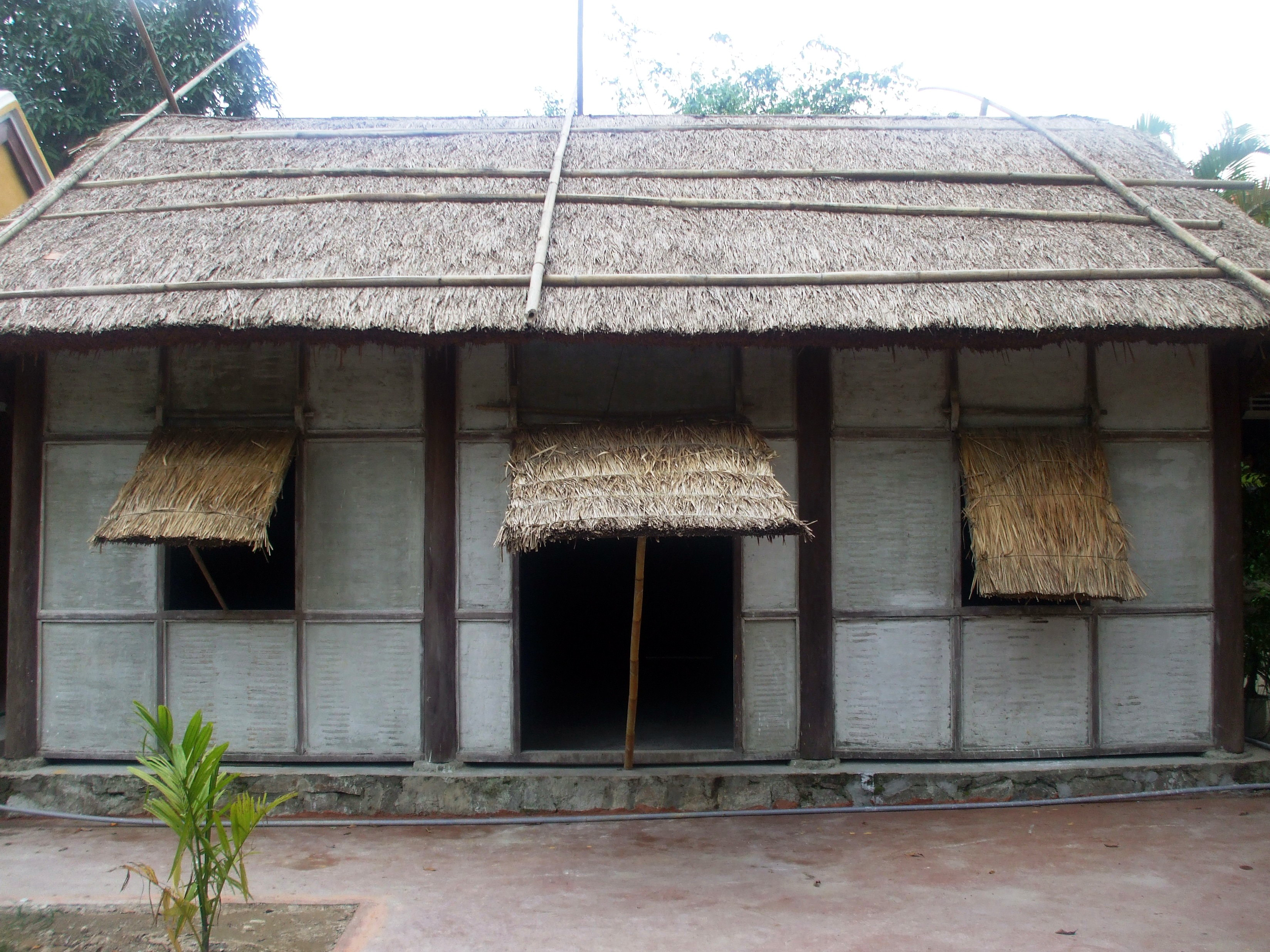 Nơi an trí Phan Bội Châu vào những năm cuối đời (Bến Ngự, TP. Huế, Việt Nam).